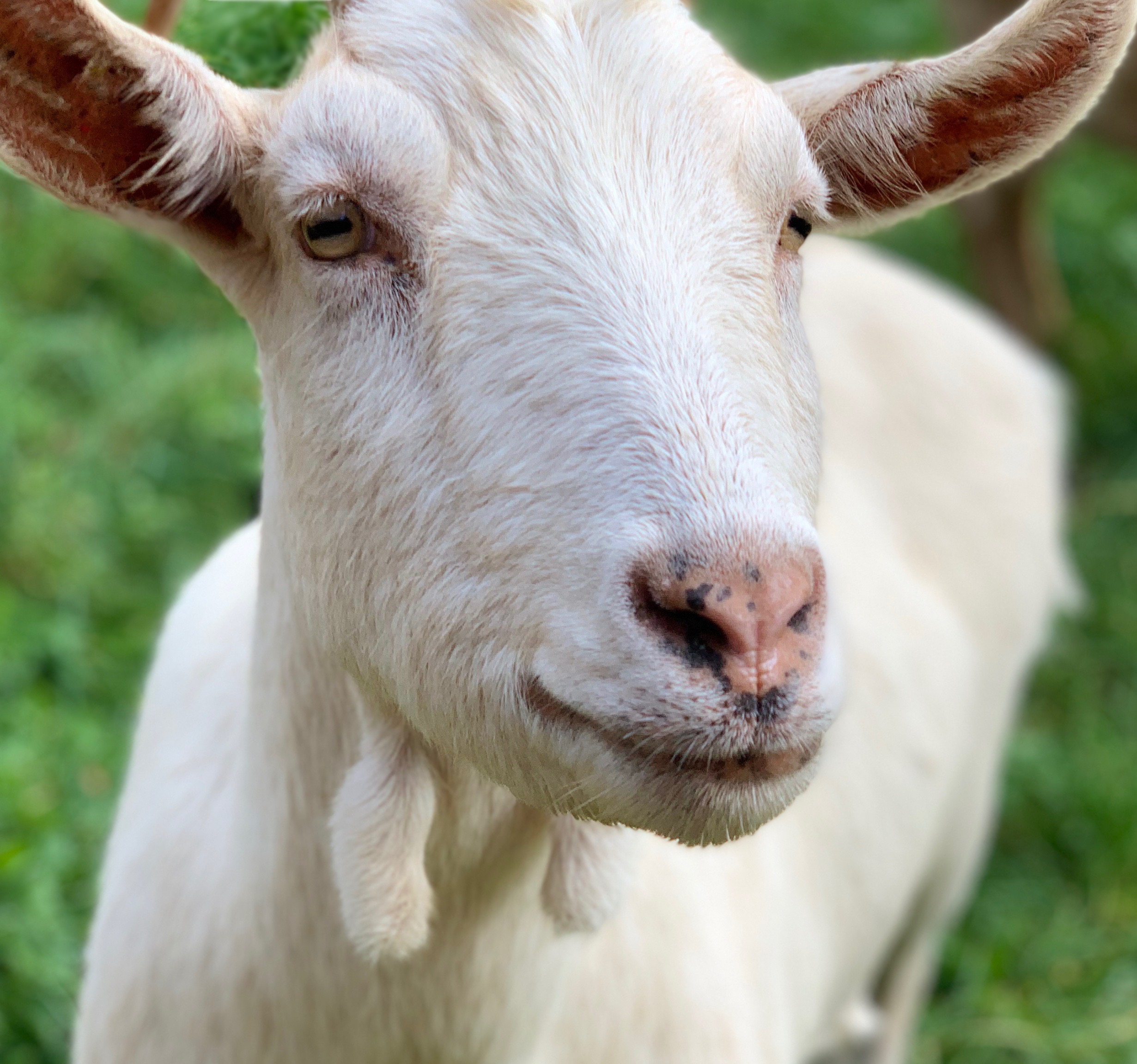 Ziegenkopf im Porträt